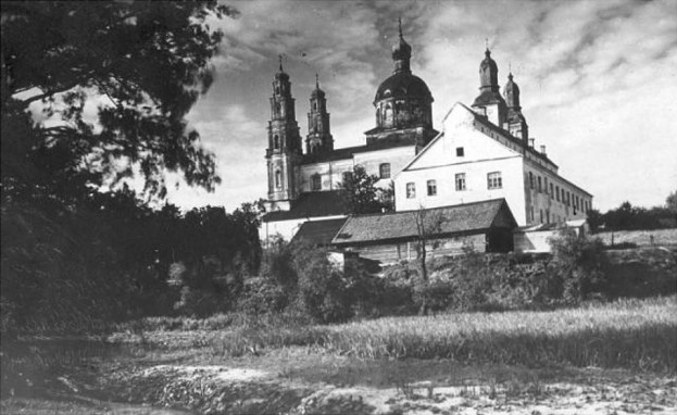 Беларуская (тарашкевіца): Глыбокае (Hłybokaje), вуліца Кармэліцкая (vulica Karmelickaja). Касьцёл Унебаўзяцьця Найсьвяцейшай Панны Марыі і кляштар кармэлітаў па частковым руйнаваньні расейскімі ўладамі